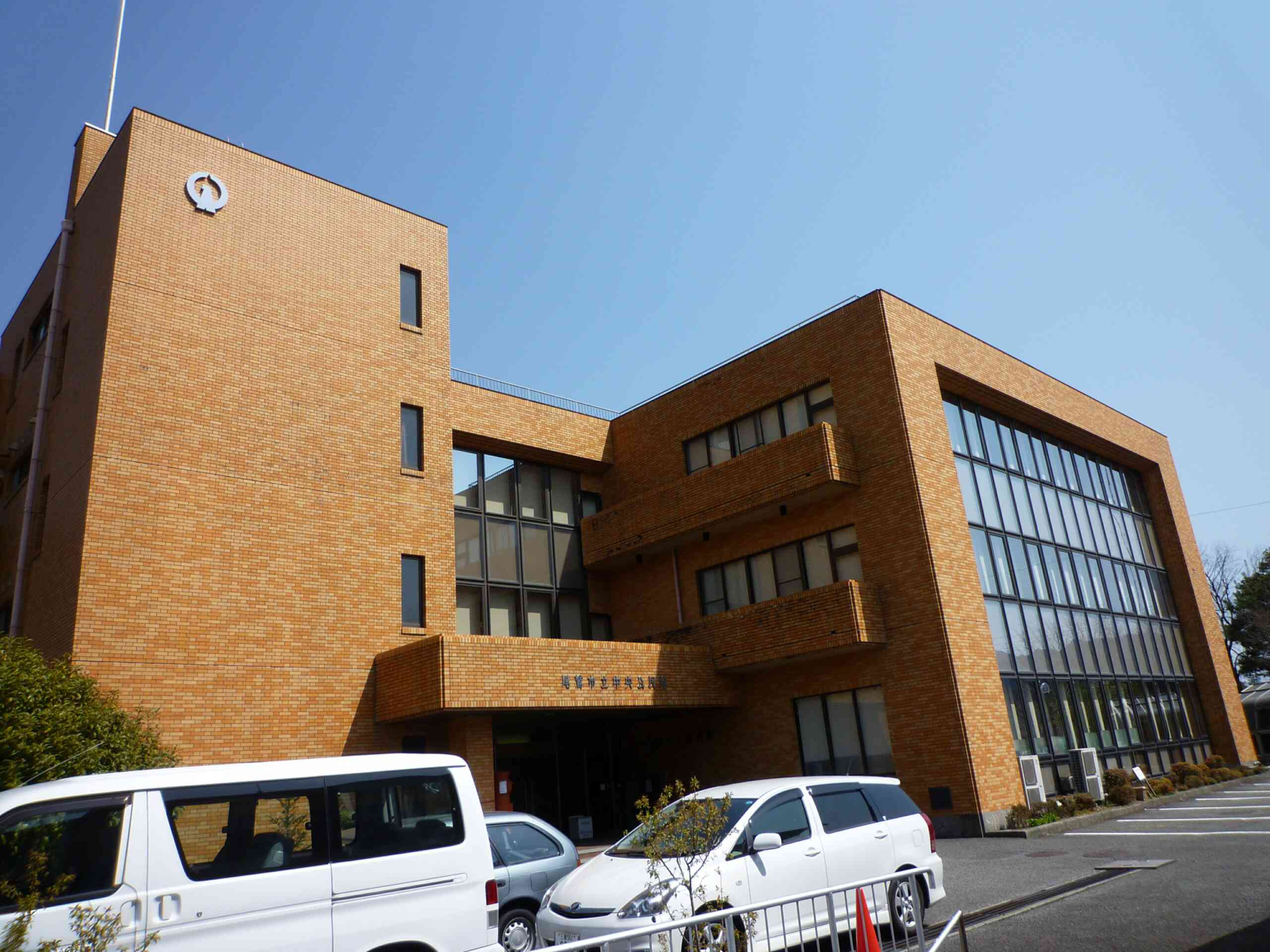 尾鷲市立中央公民館。2階に尾鷲市立図書館がある。